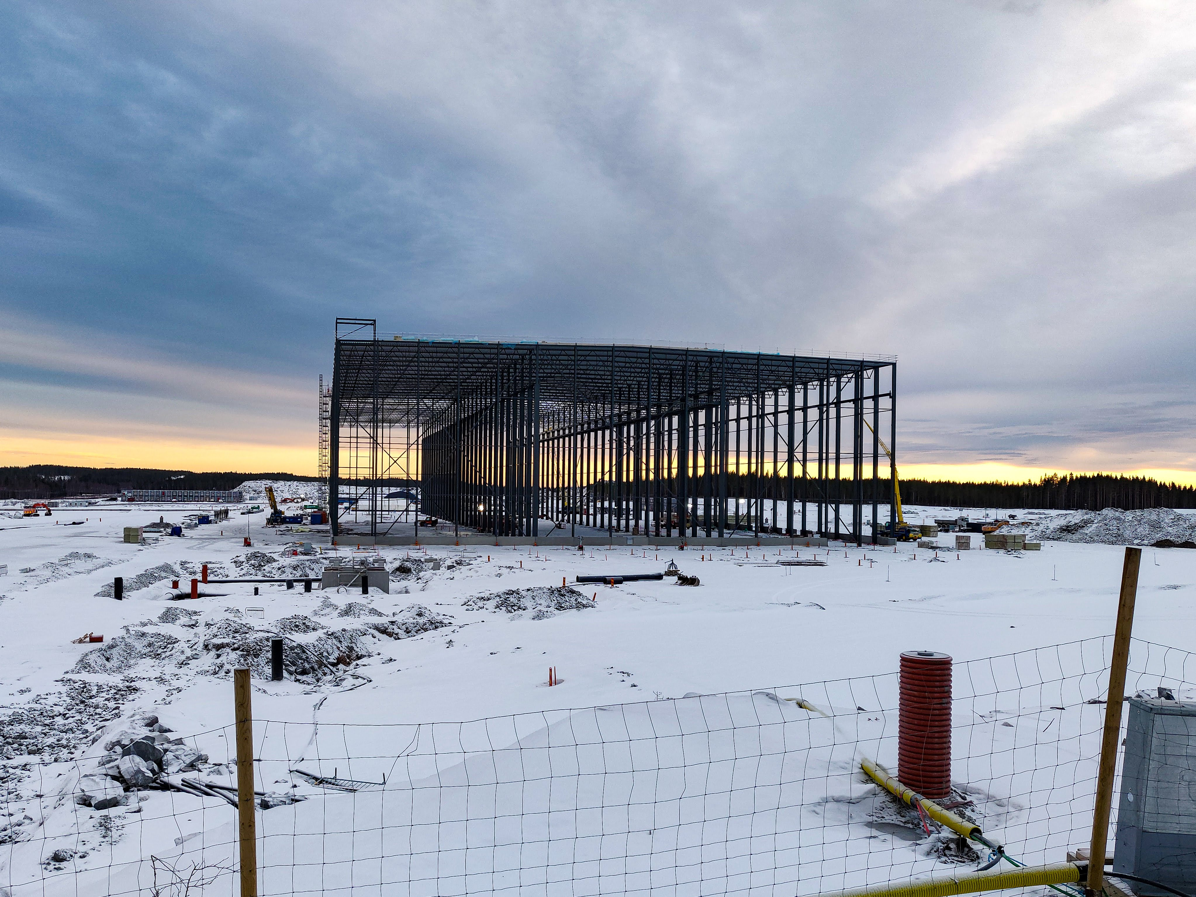 Northvolt Ett i januari 2020